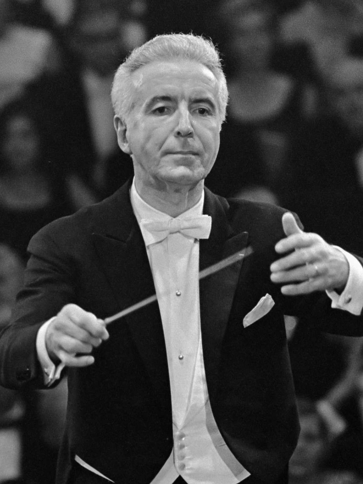 Grand Gala du Disque Klassiek . Jean Fournet , dirigent Rotterdams Philharmonisch Orkest 6 oktober 1967